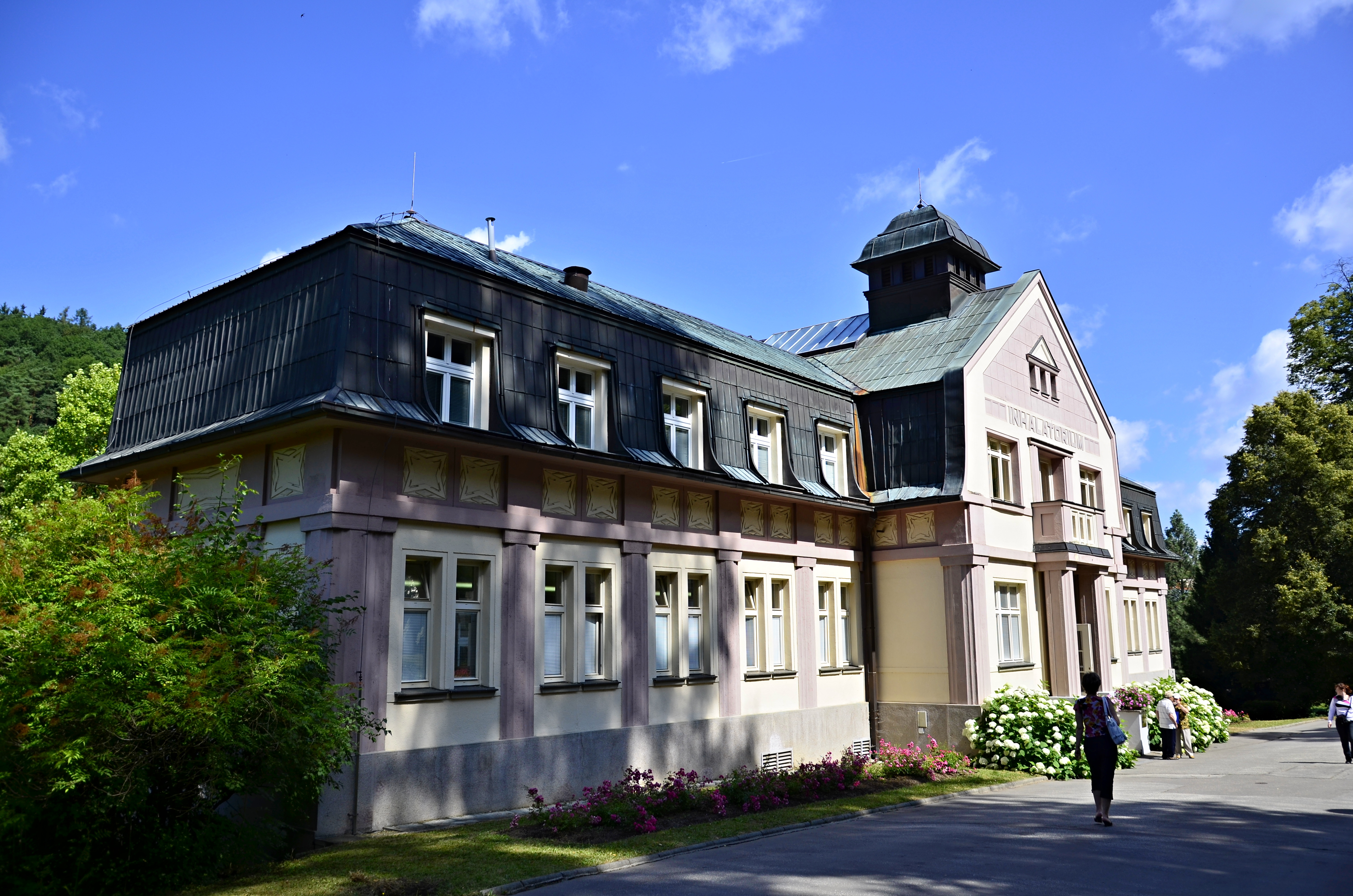 Lázeňský dům Inhalatorium (Luhačovice), ul. Dr. Palka Blaho 361, Luhačovice